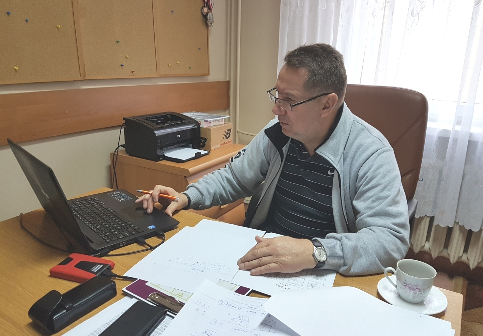 Krzysztof Koziorowicz (22.11.2018)